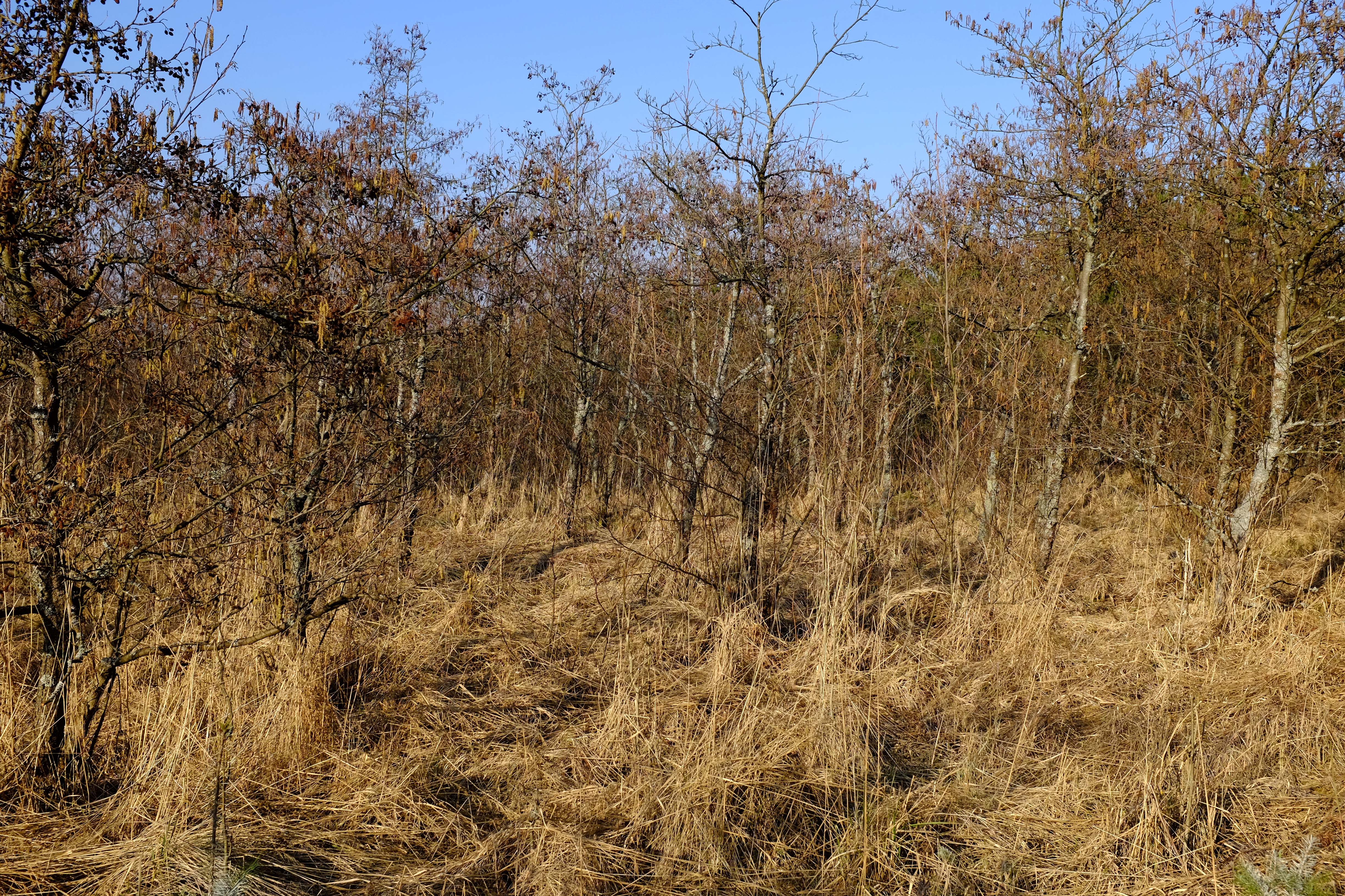 Lítovská výsypka, vrcholová partie, okres Sokolov